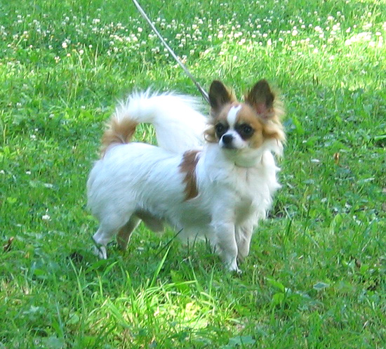 Chihuahua long coat (Mali-PL Di Rio Galeria - Russian kennel "Ot Chempionov")